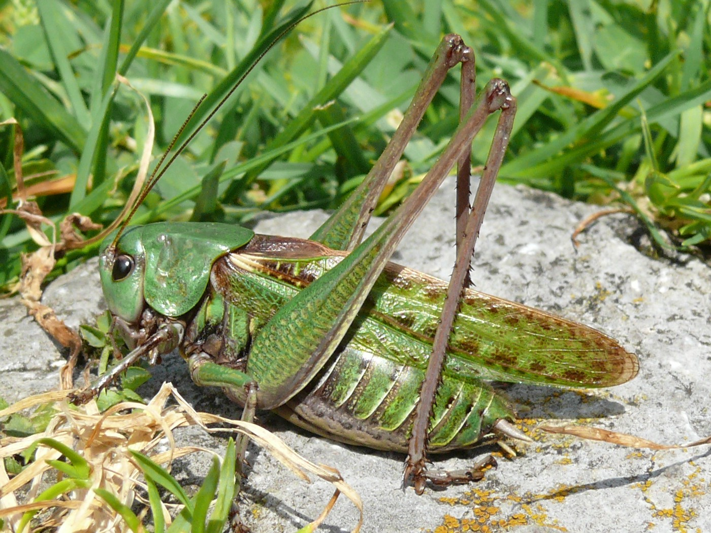 Decticus verrucivorus